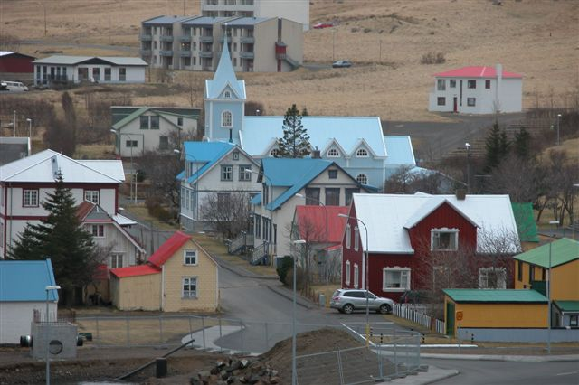 Seyðisfjörður